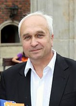 Województwo Dolnośląskie